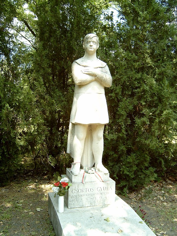 Csortos Gyula sírja Budapesten. Mikus Sándor (1903–1982) alkotása 1970. Kerepesi temető: 10-7-2.